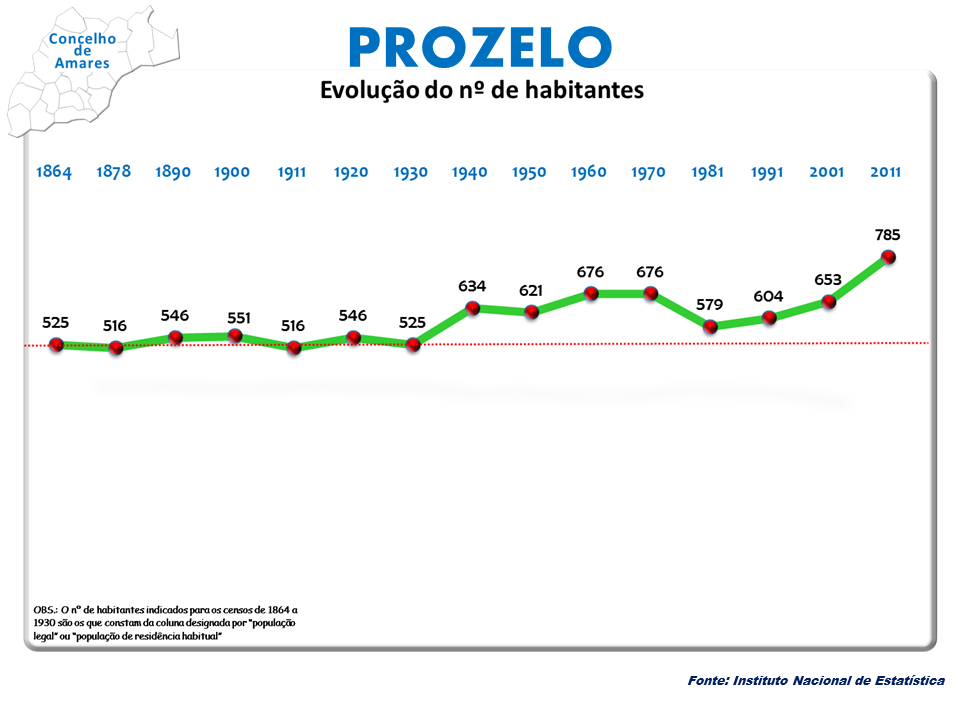 Censo 2011